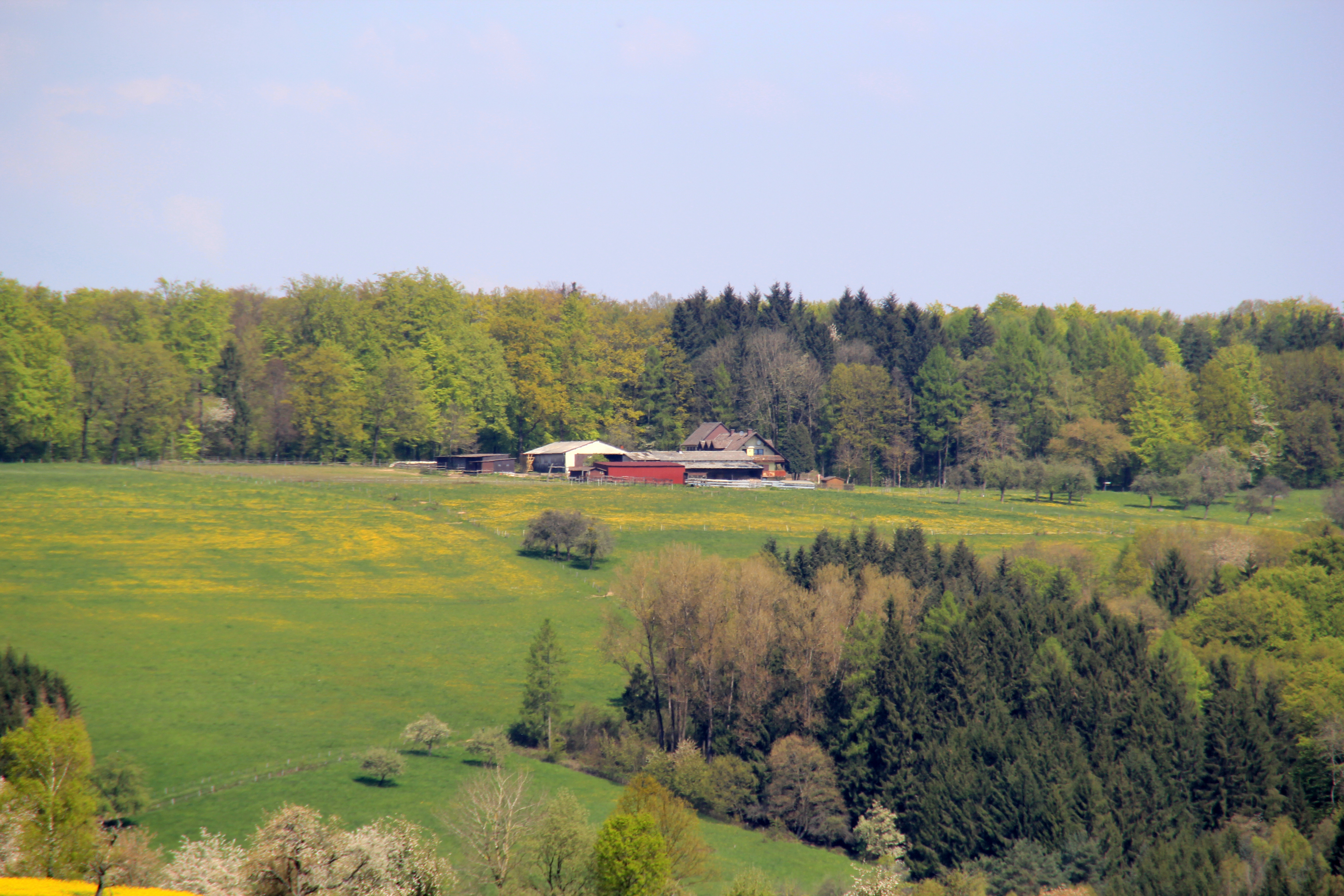 Fohnbügel bei Geiselbach von Südosten